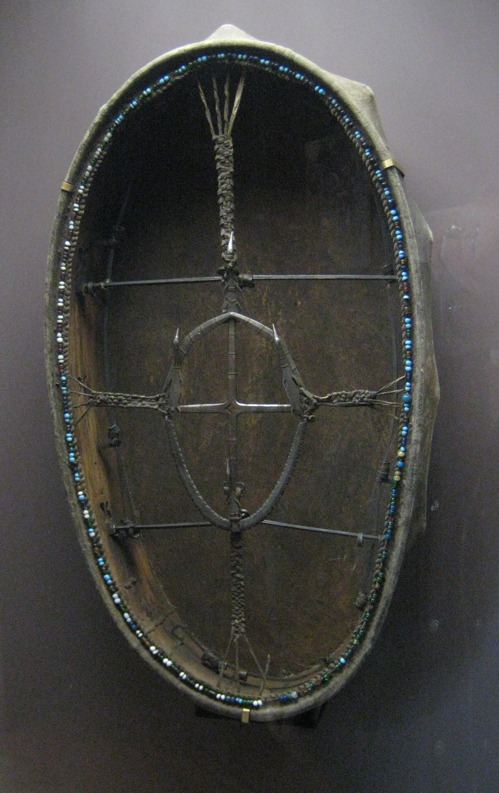 Тунгусы (эвенки). Бубен шаманский. Российская империя, конец 19-начало 20 века. Кожа, дерево, металл, бусы. Российский этнографический музей. Выставка "Путешествие Николая Александровича"